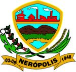 Brasão de Nerópolis, Goiás, Brasil.